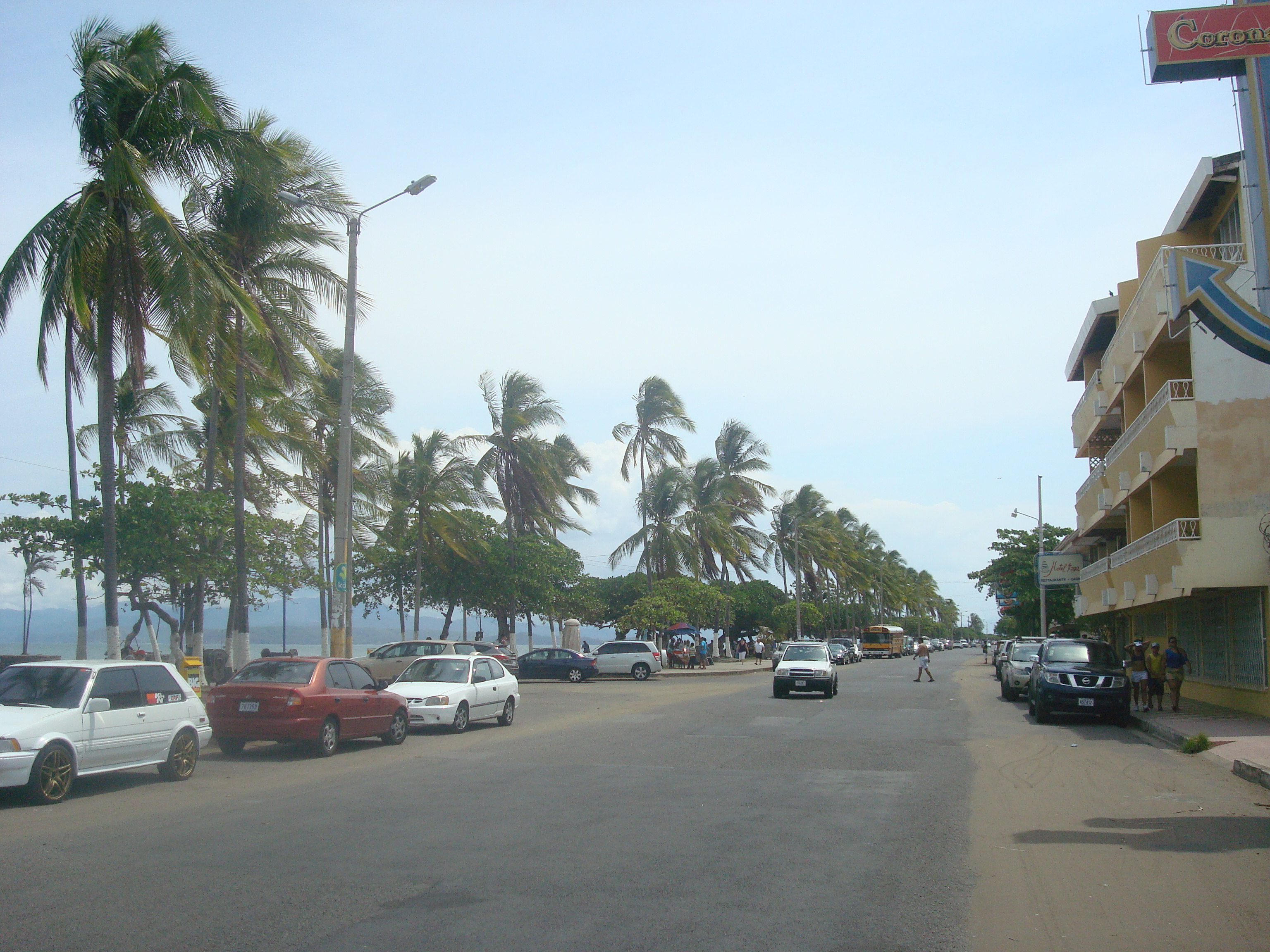 Vista del Paseo de los Turistas, la principal avenida de la ciudad de Puntarenas, Costa Rica.